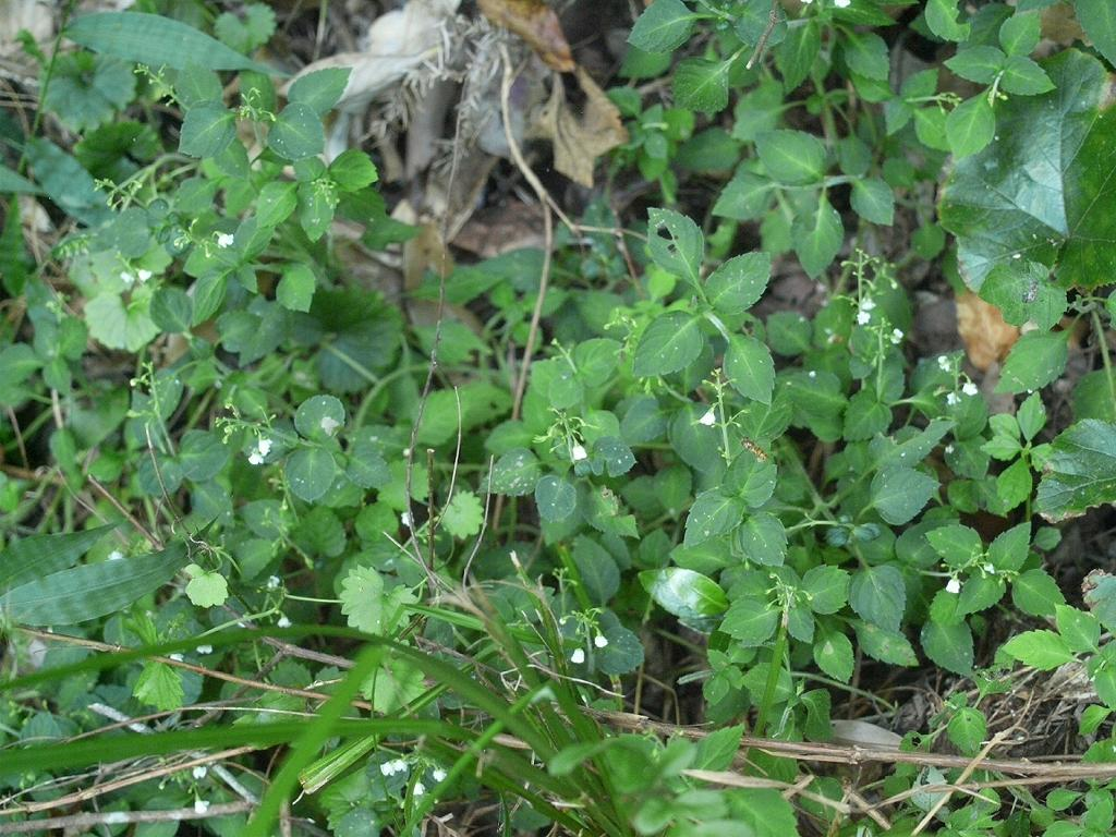 Perillula reptans：スズコウジュ 2009/09/26 和歌山県田辺市：Tanabe City, Wakayama Pref. Japan